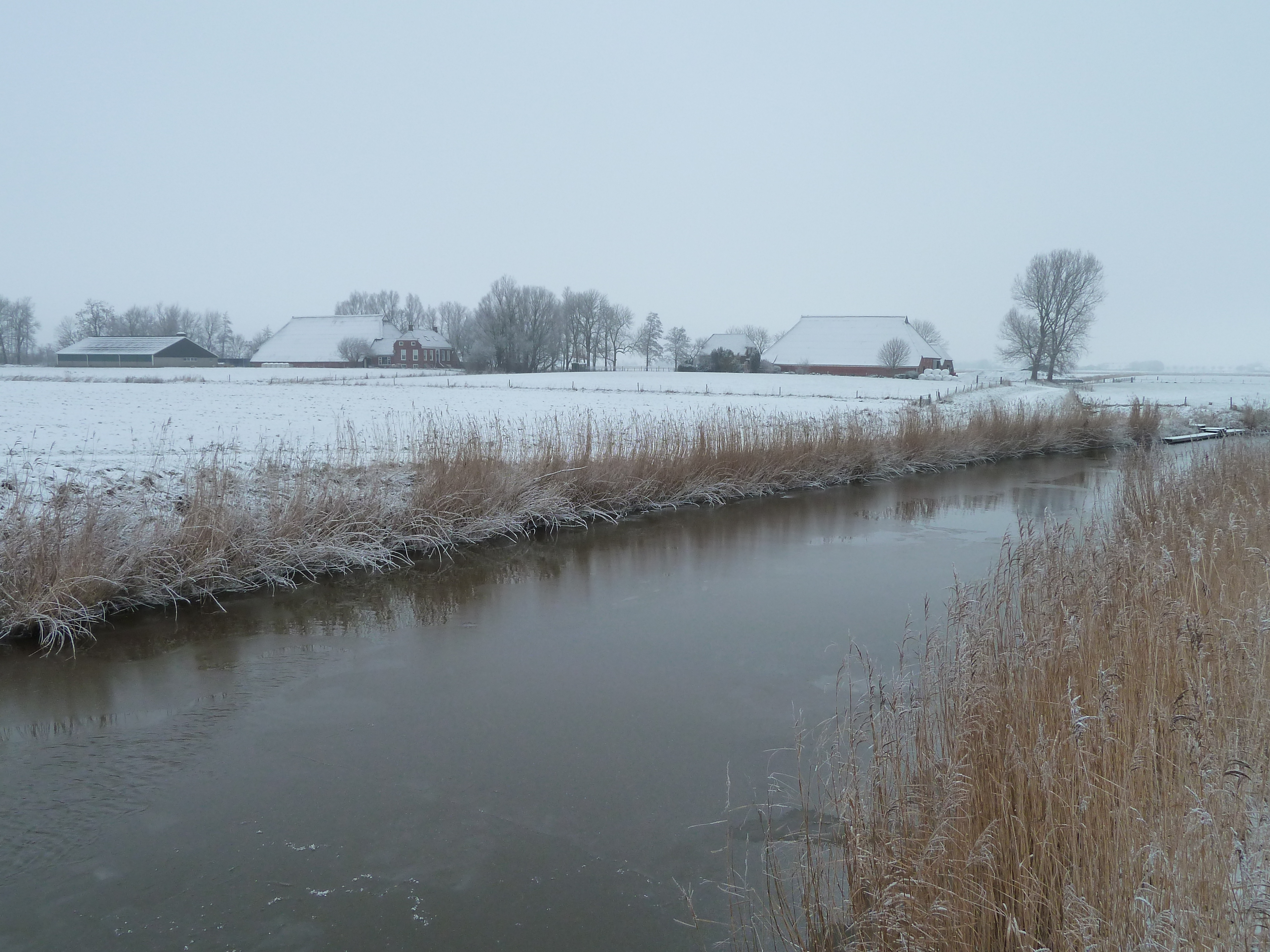 De twee oostelijkste boerderijen van Grijssloot (Groningen, Nederland) gezien over de Hoornse Vaart.